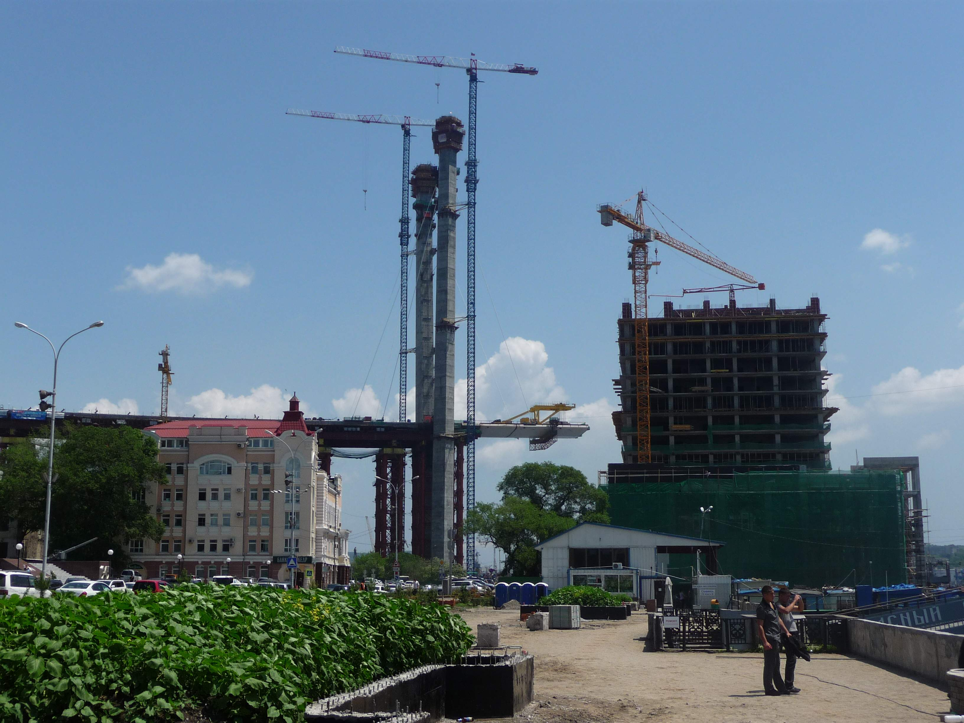 Монтаж третьей секции главного пролёта со стороны Владивостока